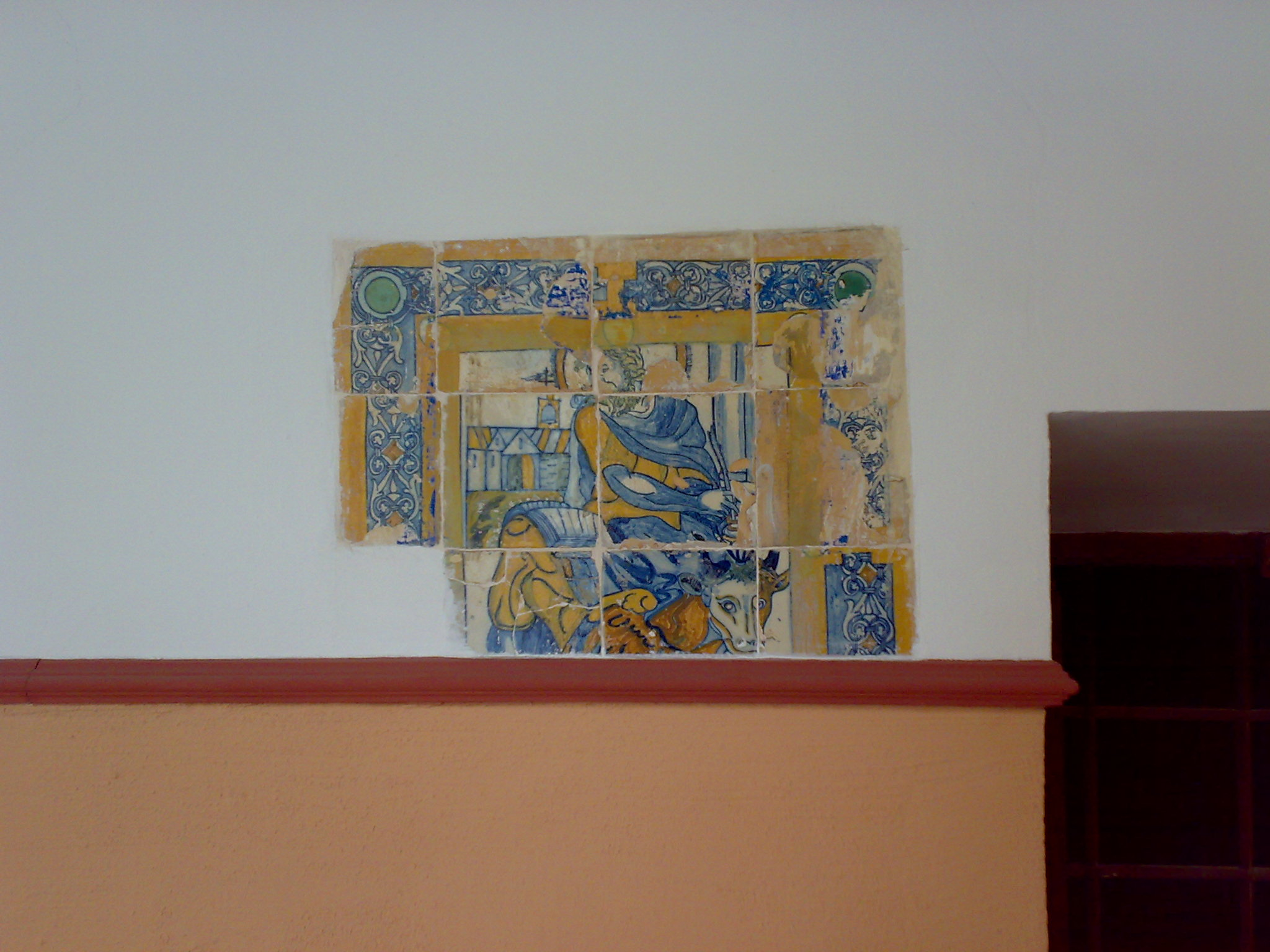 Mosaico en un antigüo convento de Rocafort, reconvertido en centro de día.